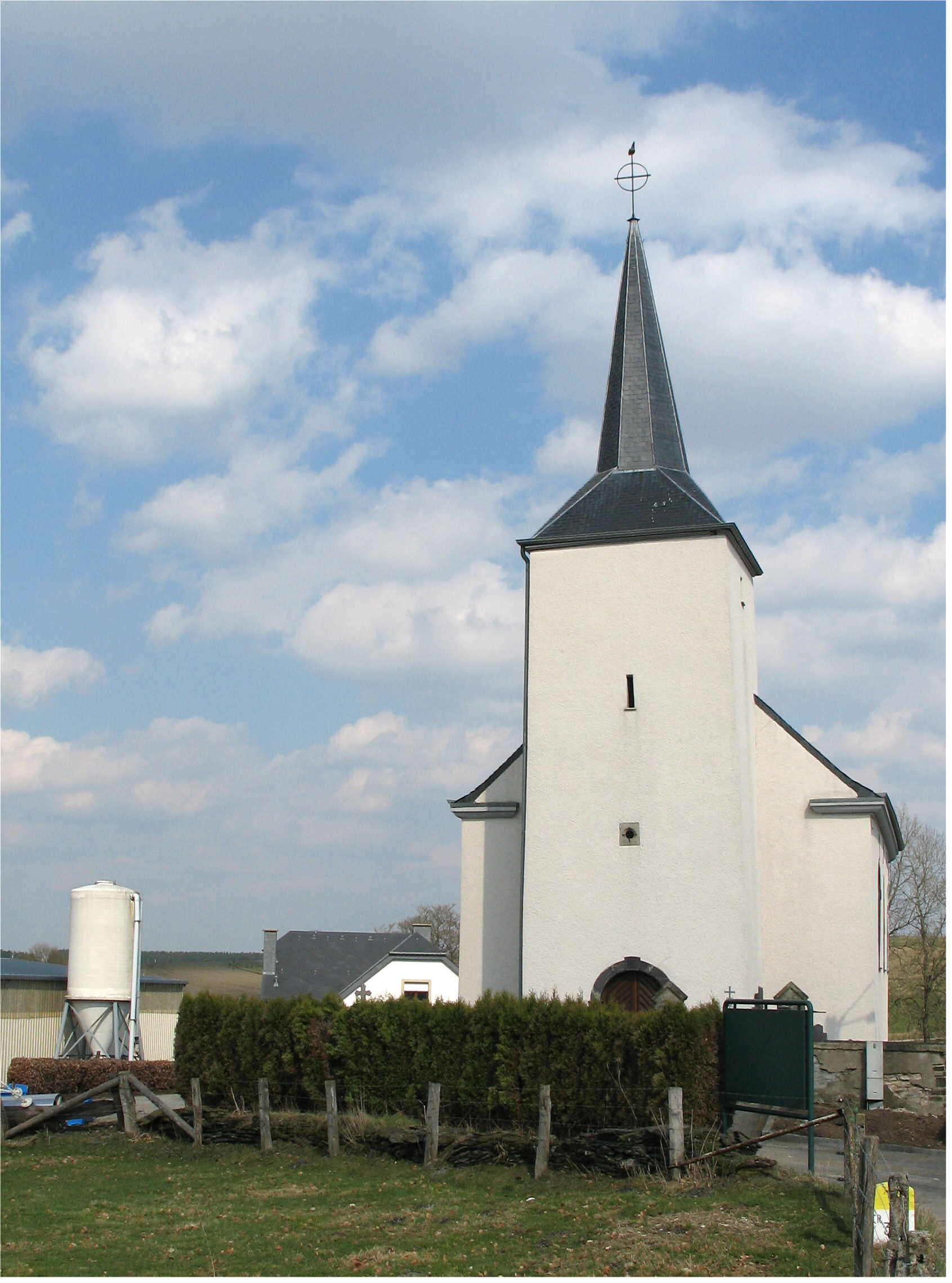 Sujet : Kierch zu Kréindel Source : Eege Foto Johnny Chicago (AbrÃ«ll 2006) Lizenz